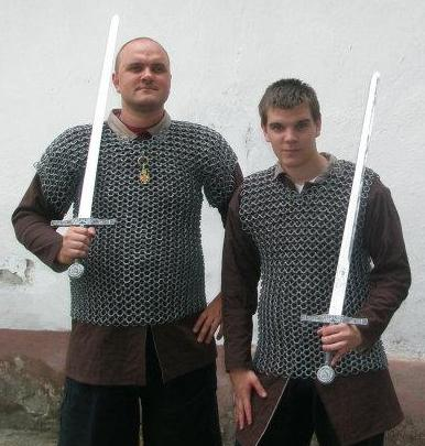 DrMako with his brother, wearing home-made replicas of gambesons and mail armor. Photo taken in Sremska Mitrovica, Serbia, summer of 2012.